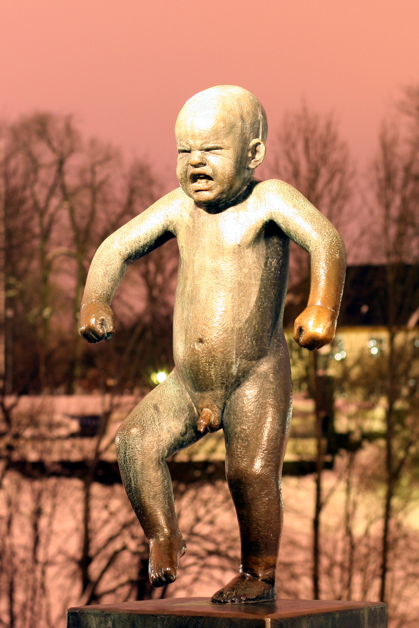 Sinnataggen